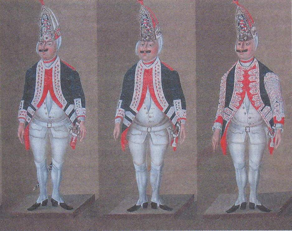 Primasenser Grenadiere